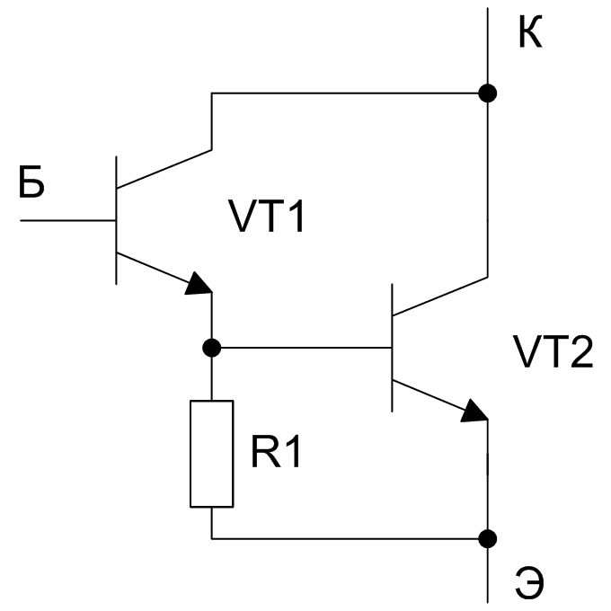 Принципиальная схема составного n-p-n транзистора